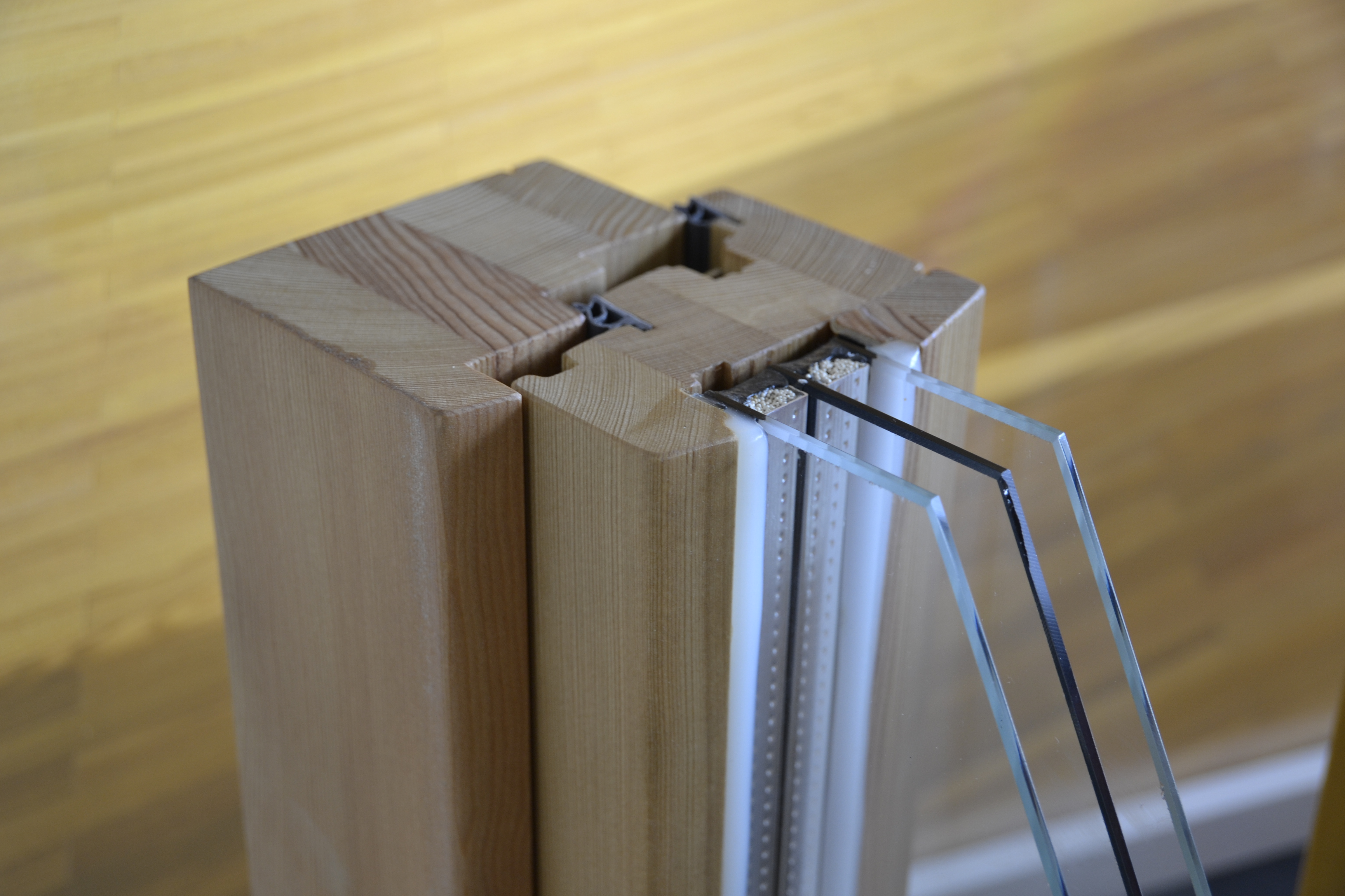 Mehrscheiben-Isolierglas-Profil.